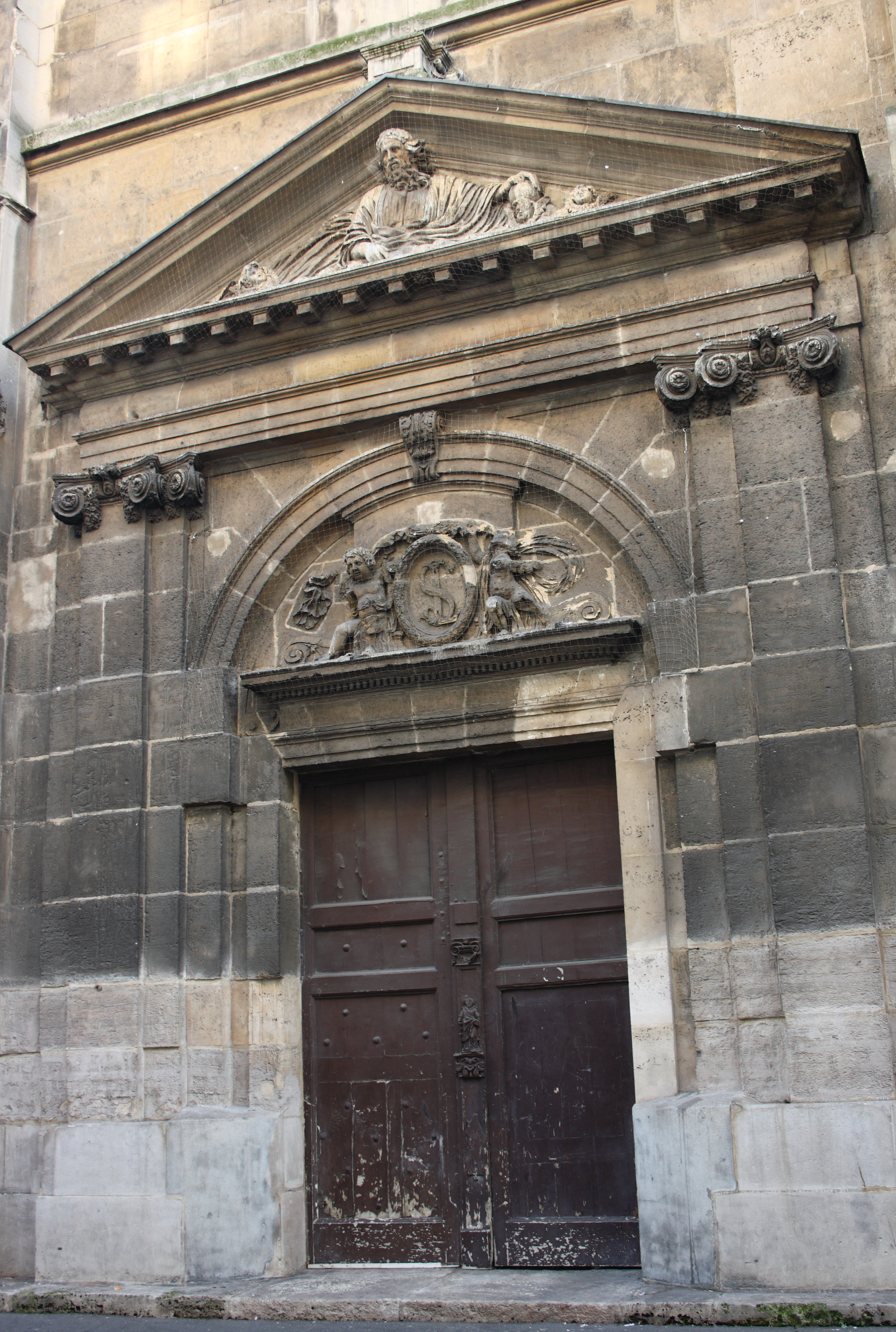 Katholische Pfarrkirche Saint-Laurent im 10. Arrondissement von Paris, Nordportal